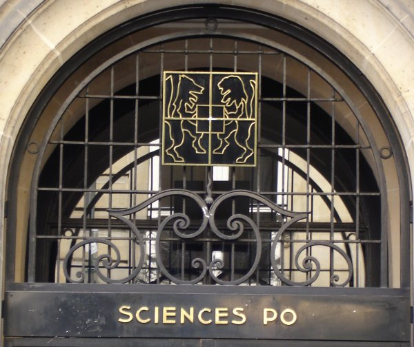 Lunette de la porte de l'Institut d'études politiques (Paris, VIIe arrondissement)